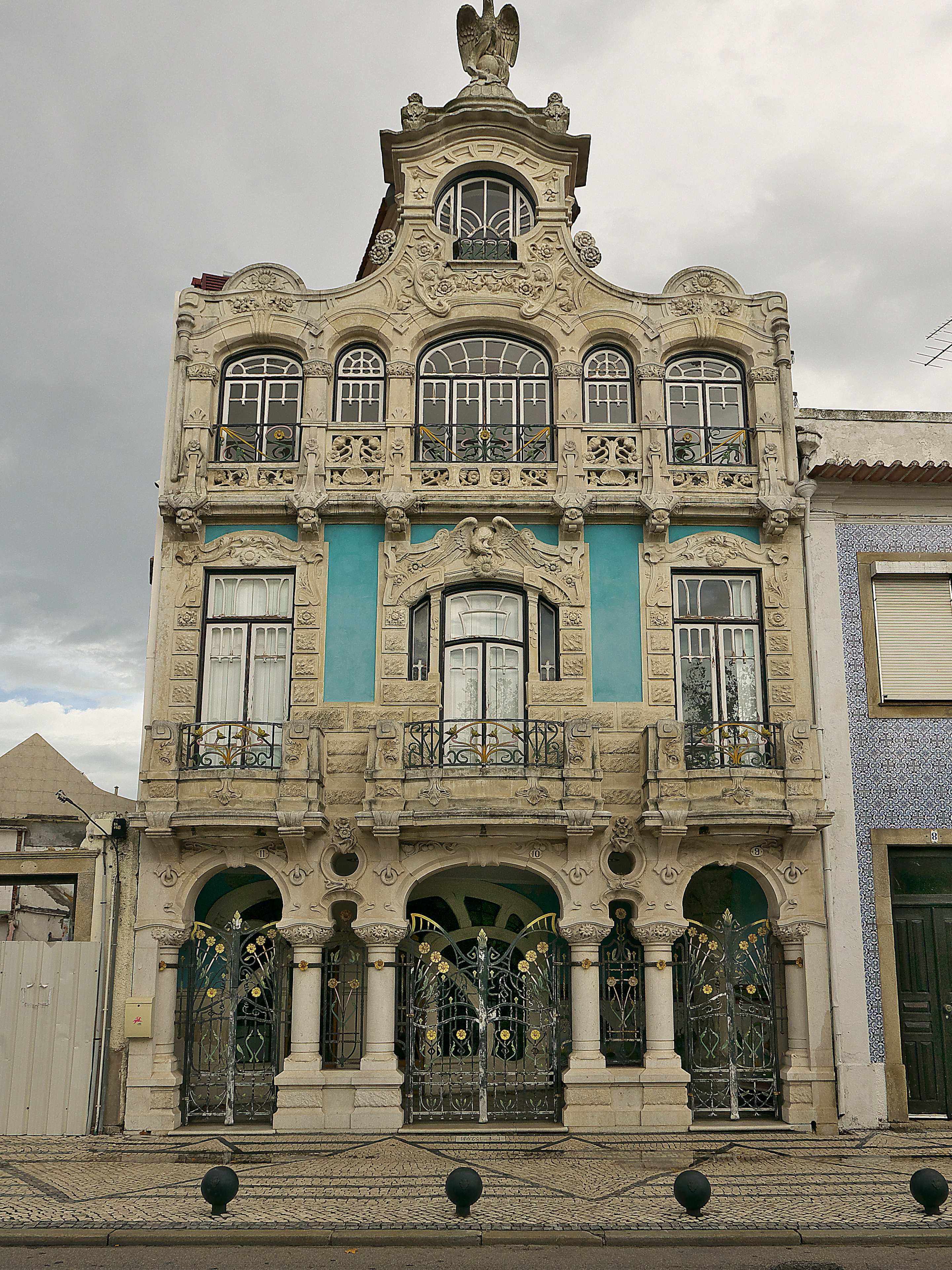 Edificio de Francisco Augusto da Silva Rocha y Ernesto Korrodi (1907-1909).